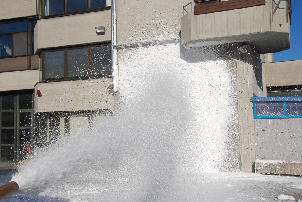 Trockener Druckluftschaum zum Schützen von Oberflächen